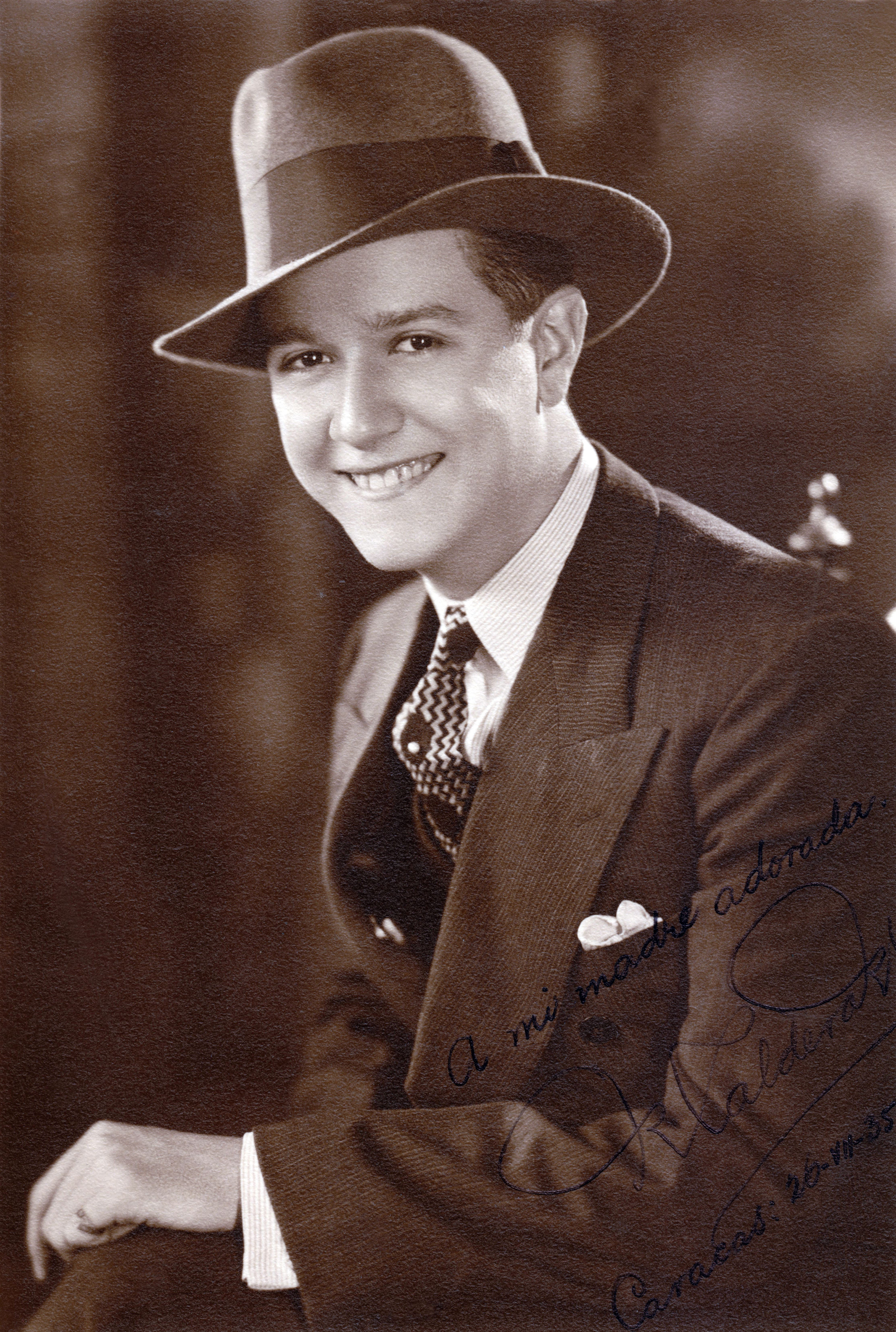 El joven Rafael Caldera a los 19 años, vestido a la usanza de la época.